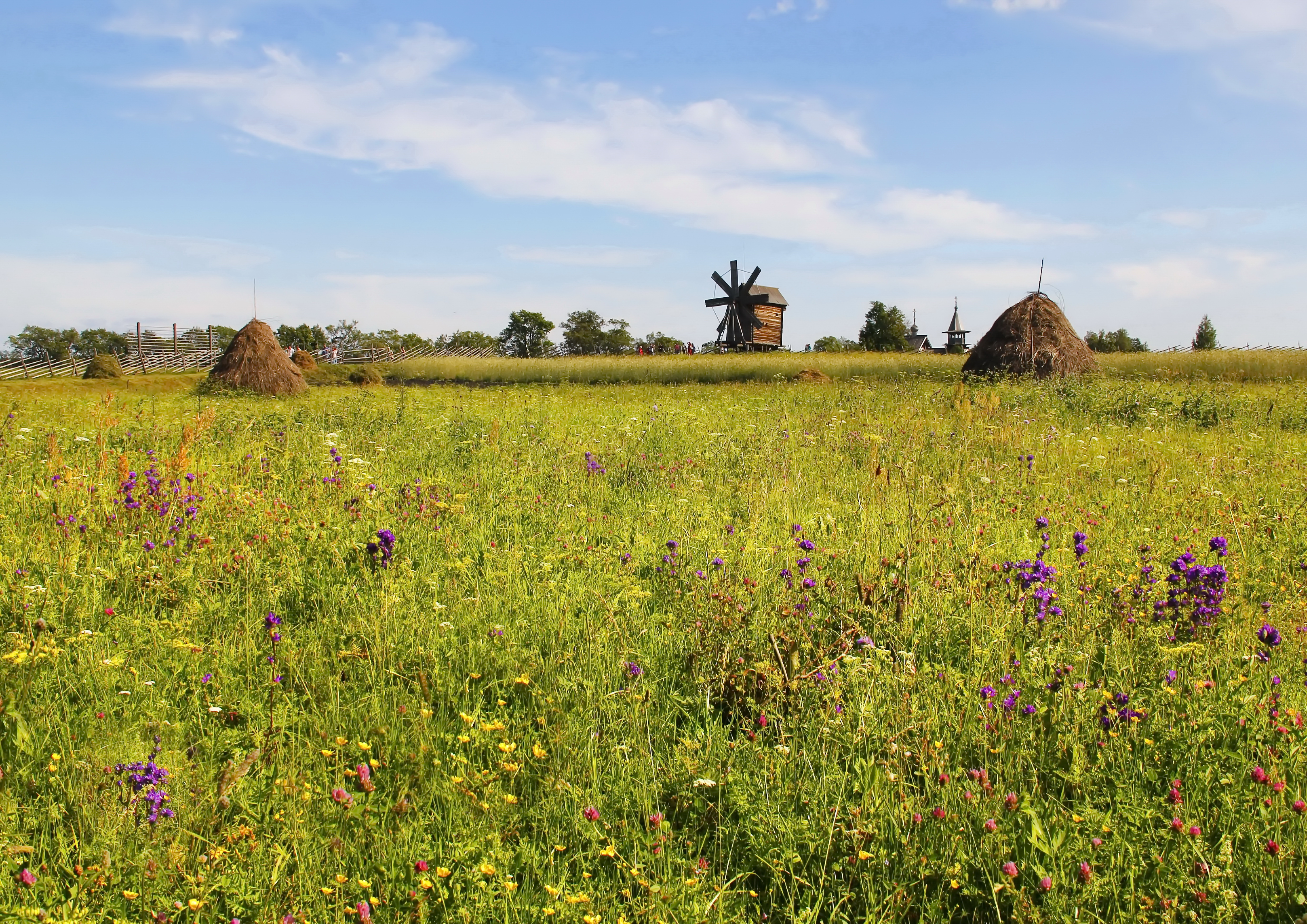 Кижский зоологический заказник: В шхерах северо-западной части Онежского озера в окрестностях д. Сенная Губа и о. Кижи (Заонежский лесхоз/Кижское л-во, кв. 22-25, 36-38, 48, 57, 58, 65-69, 70-151 с однокилометровой зоной акватории, а также о. Черный с 500-метровой зоной акватории), в том числе включает охранную зону музея-заповедника "Кижи", имеющую статус земель историко-культурного назначения, Медвежьегорский район, Карелия This image is related to the protected area of Russia number 1000081